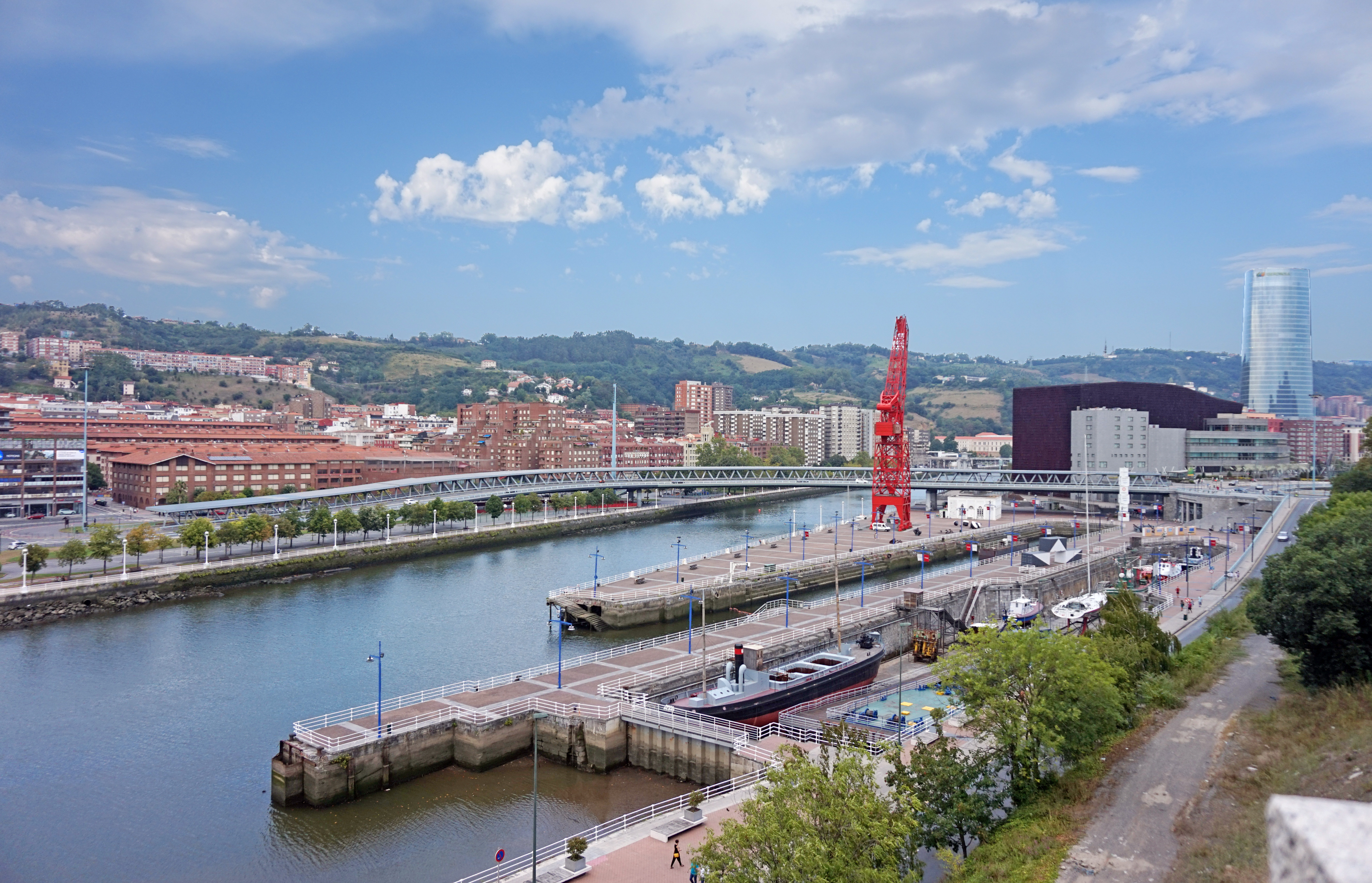 Bilbao.This photograph was taken with a Sony ILCE-5000